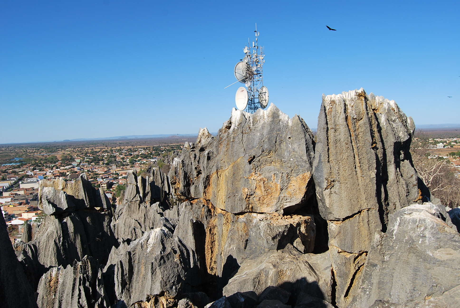 Pedras no topo do Santuário de Bom Jesus da Lapa, em setembro de 2010.